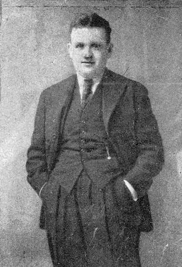 Nicolás García Pereira, fotografía en Vida Gallega 1932